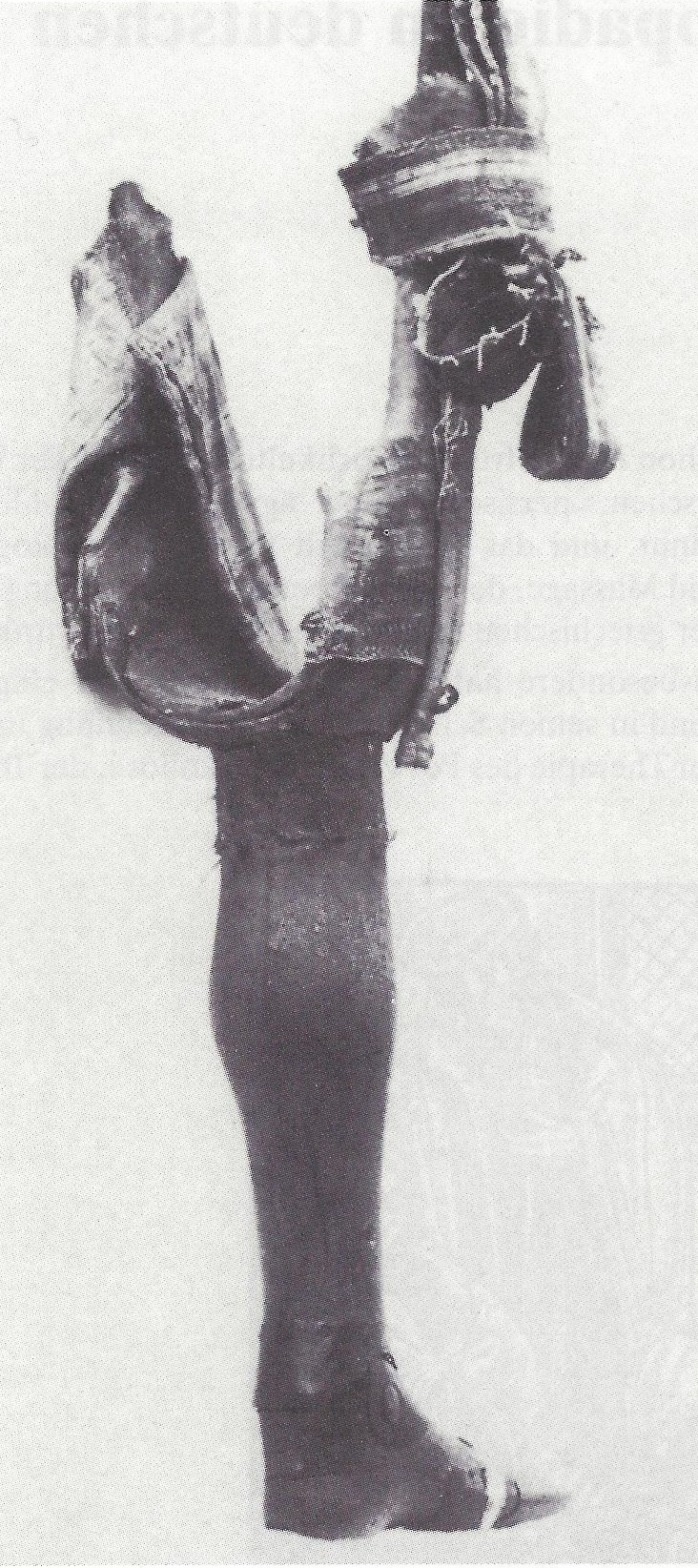 Beinprothese des Prinzen von Homburg.